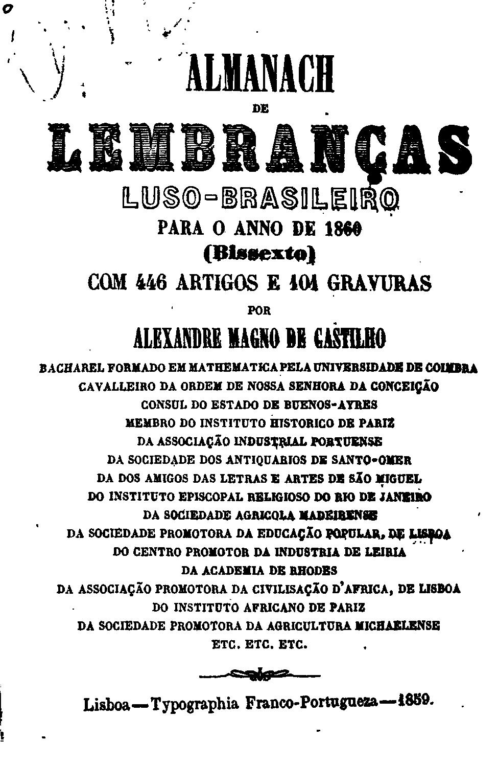 Capa do Almanaque de Lembranças Luso-Brasileiras do ano 1860.